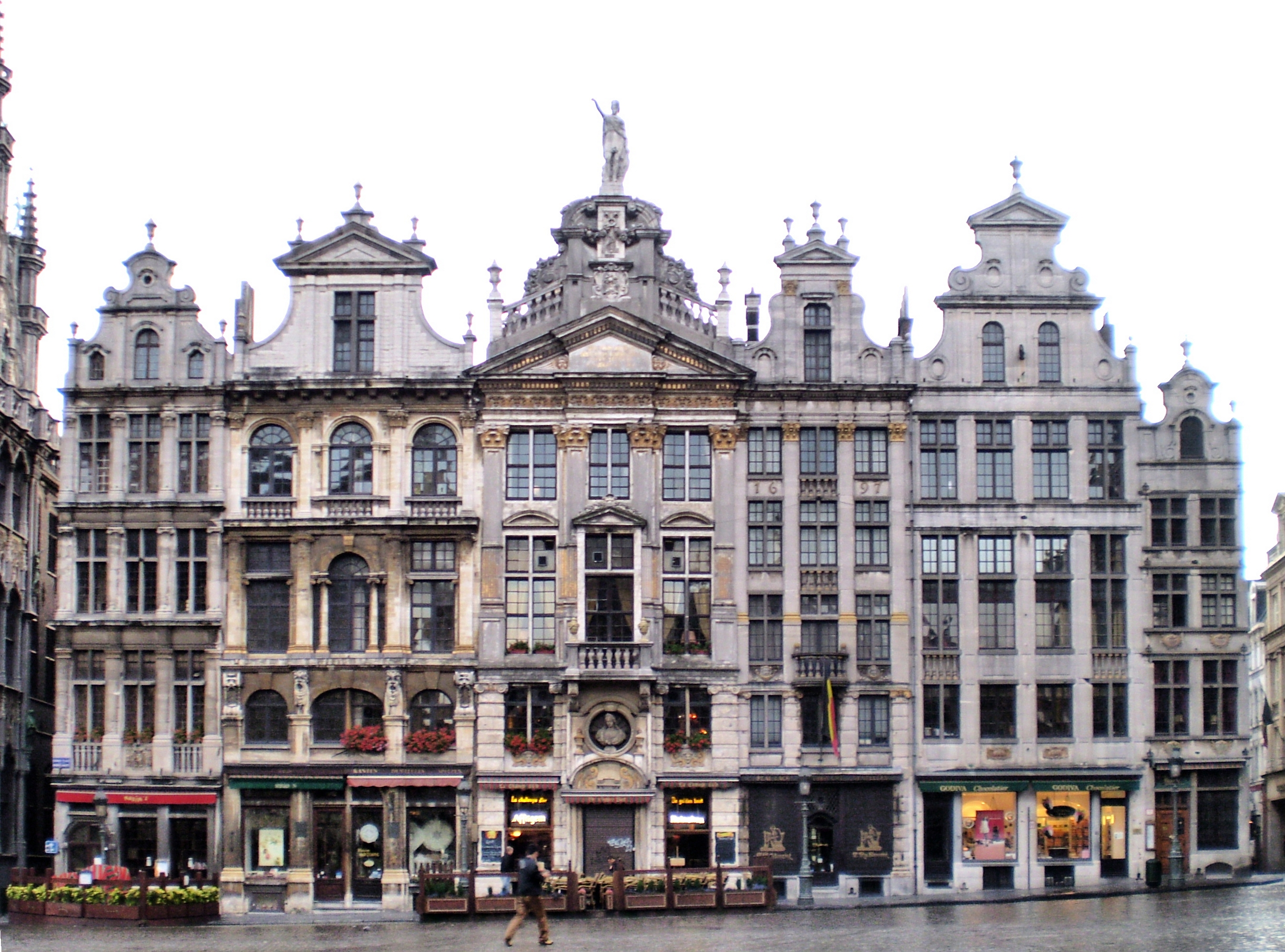 Maisons de la Grand-Place de Bruxelles, entre la rue des Harengs et la rue de la Colline (nord-est): Le Marchand d'or, Le Pigeon, La Chaloupe d'or, L'Ange, Joseph et Anne (sous une seule façade), Le Cerf volant